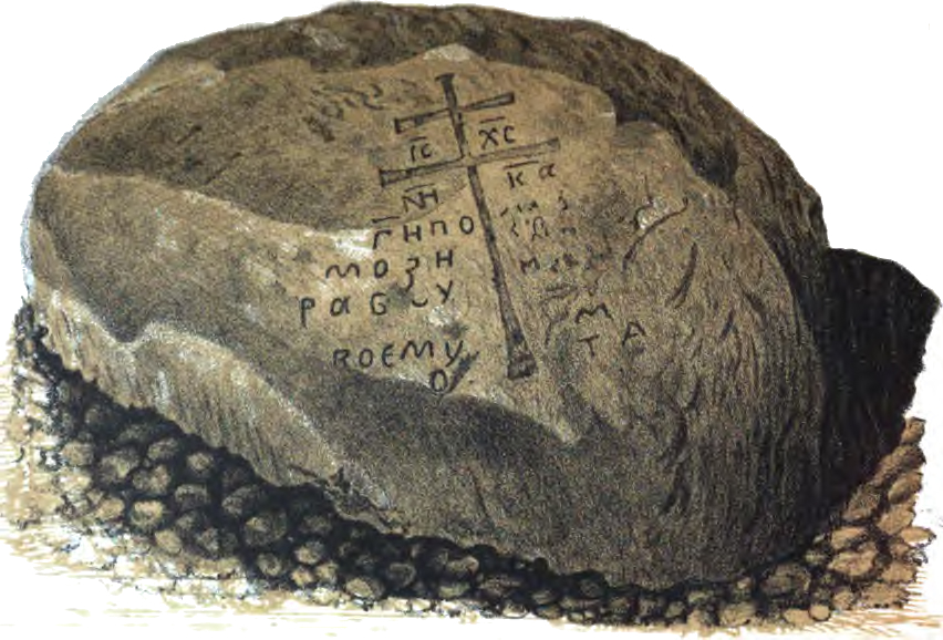 Беларуская (тарашкевіца): Друя (Druja). Барысаў камень (Barysaŭ kamień) з малюнка А. Сапунова